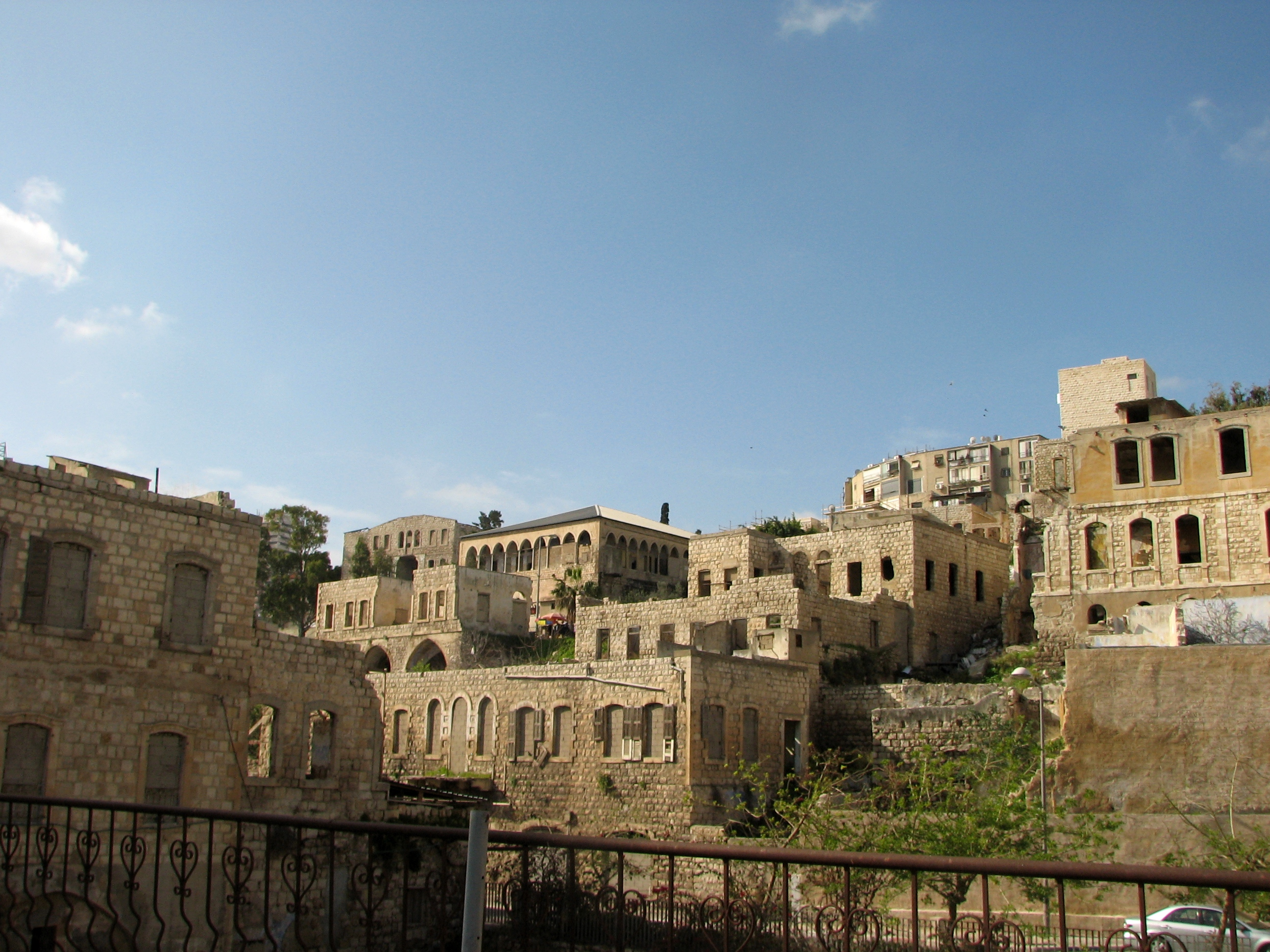 Wadi Salib in Downtown Haifa ואדי סאליב היא שכונה ברובע העיר התחתית בחיפה. הוקמה בסוף המאה ה-19 על ידי ערבים שיצאו מחומות העיר העתיקה של חיפה. השכונה ננטשה אט אט. בתחילת המאה ה-21 החלה עיריית חיפה בפרויקט שיקום השכונה והפיכתו לרובע אמנים צילום לכיוון דרום של בתי השכונה, צולם מגג החמאם ברחוב חמאם אל-פאשה